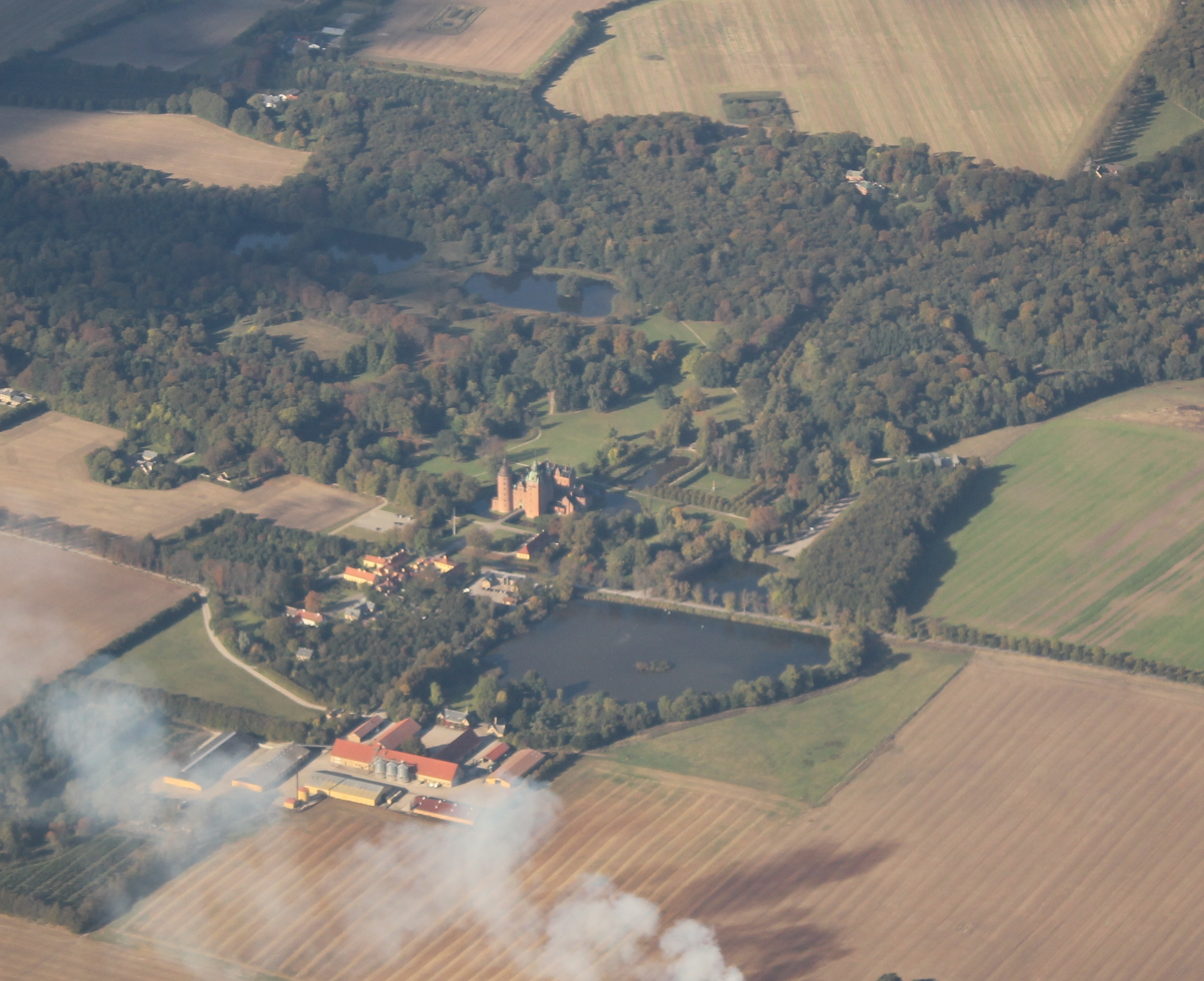 Vallø Slot set fra et rutefly mellem Madrid og København.